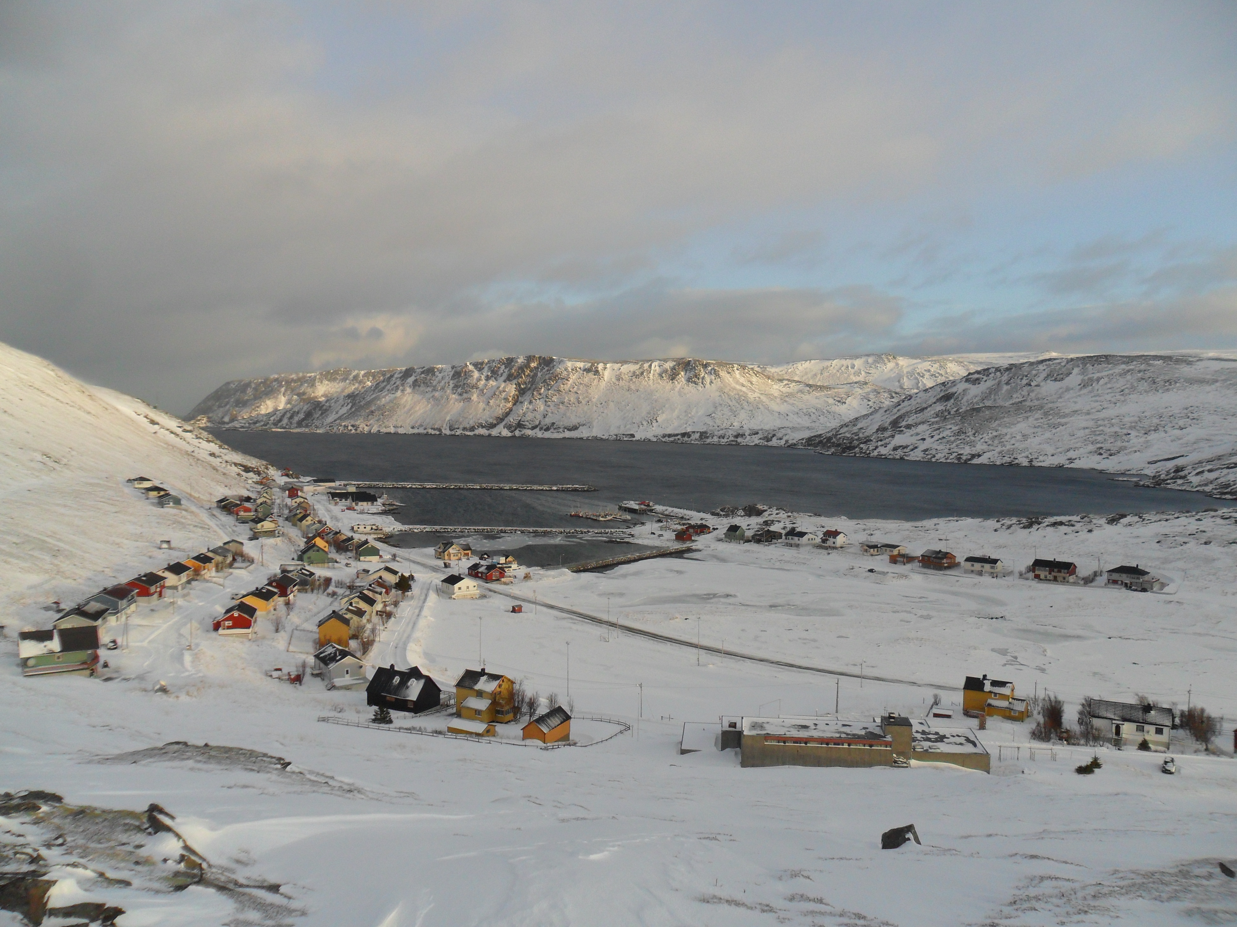 Fiskeværet Skarsvåg med Risfjorden i bakgrunnen.